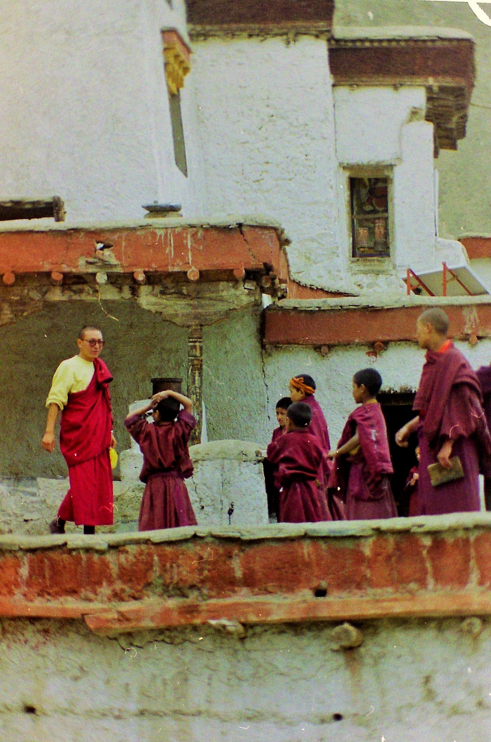 Rizong Gompa une école du Bouddhisme (scan d'une de mes photos prise lors d'un voyage au Ladakh en 1995)